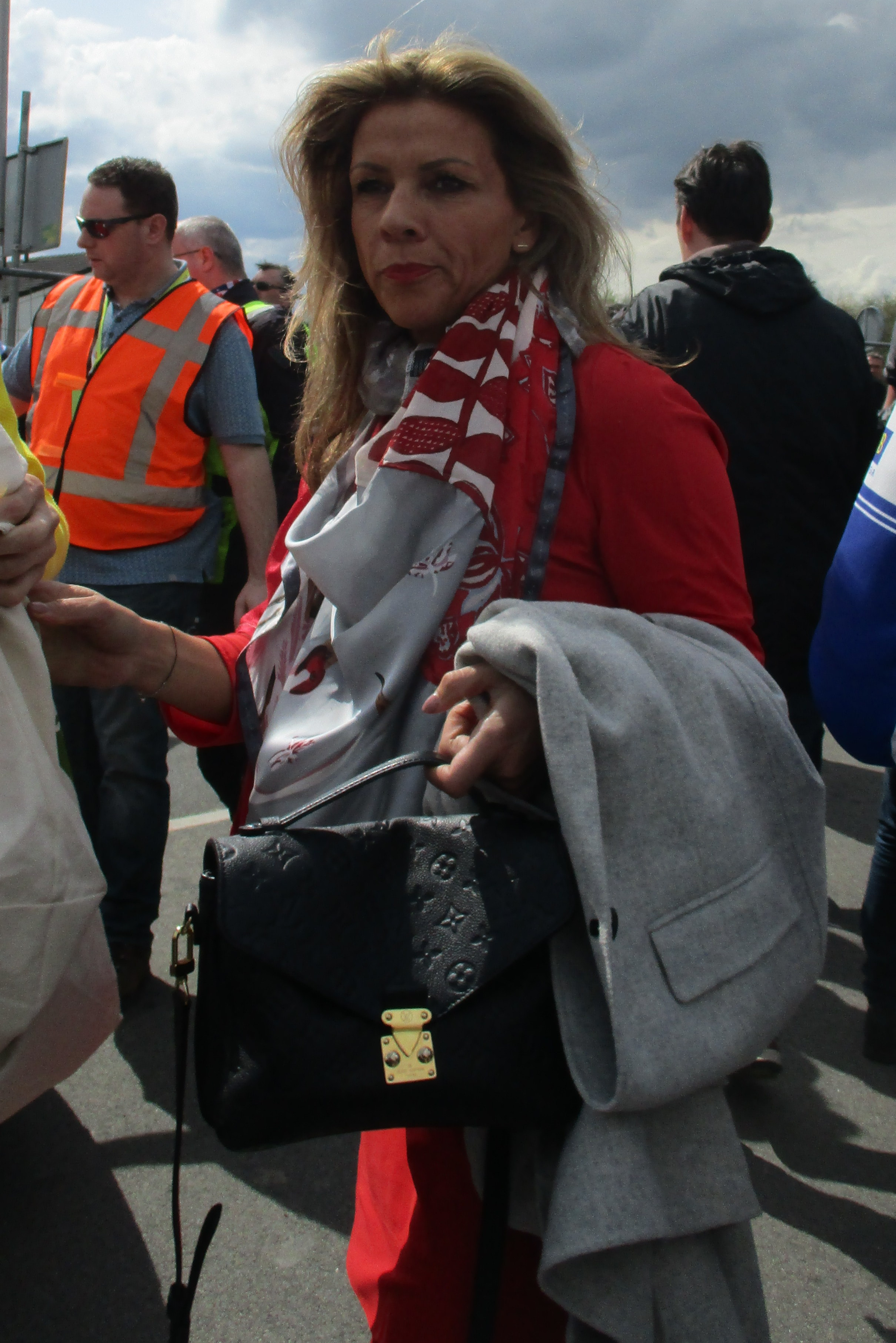 Finish van de Amstel Gold Race Ladies Edition 2018 in Berg, Valkenburg aan de Geul.